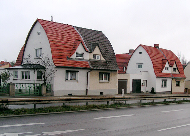 Zollingerdach-Häuser in Merseburg, Deutschland